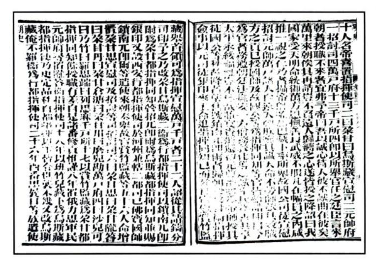 Mingshi